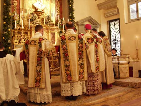 Mis Christus Koning.